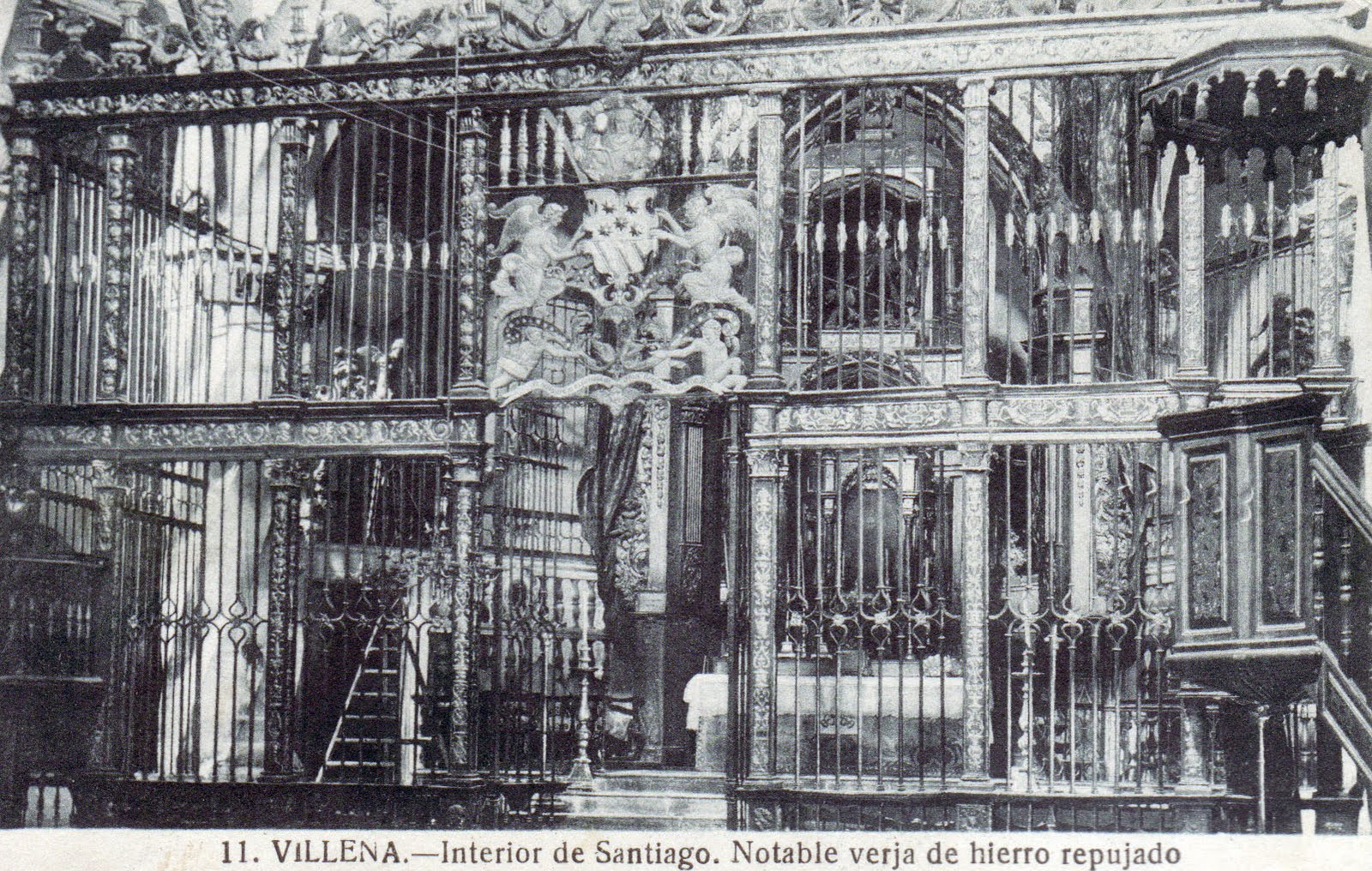 Verja de la Iglesia de Santiago de Villena, antes de su destrucción parcial durante la Guerra Civil.